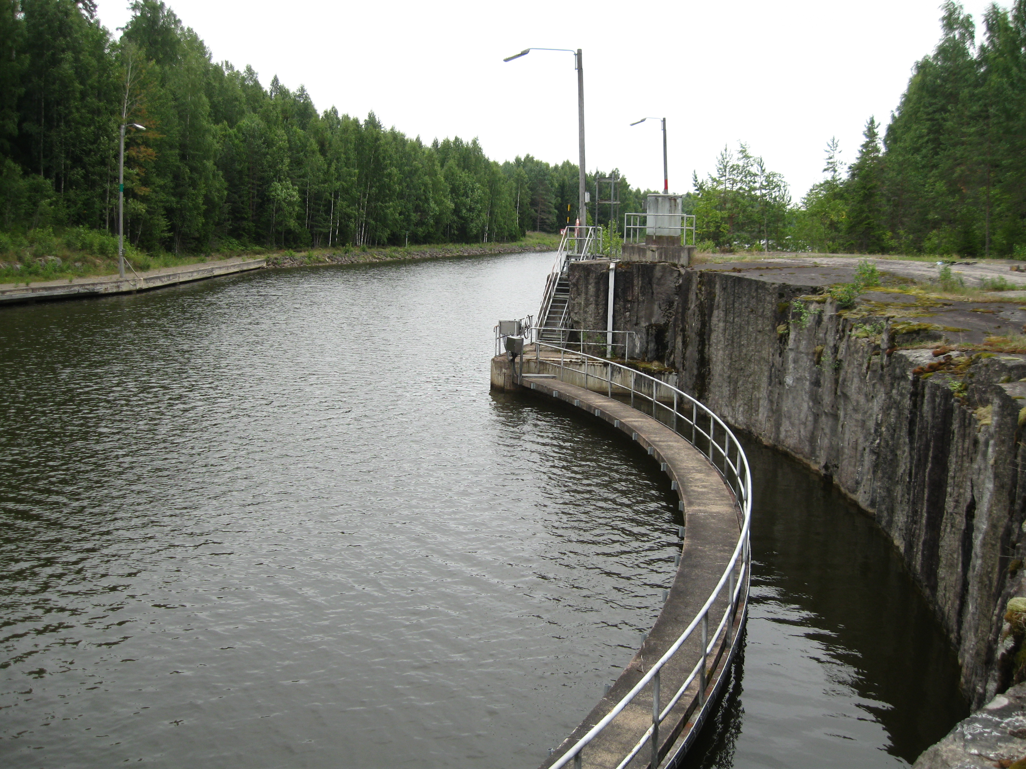 Аварийный затвор на Сайменском канале